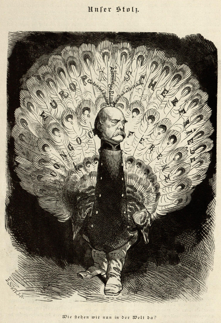 Karikatur „Unser Stolz.“ aus dem Kladderadatsch, 1884. Die Bildunterschrift lautet: „Wie stehen wir nun in der Welt da?“